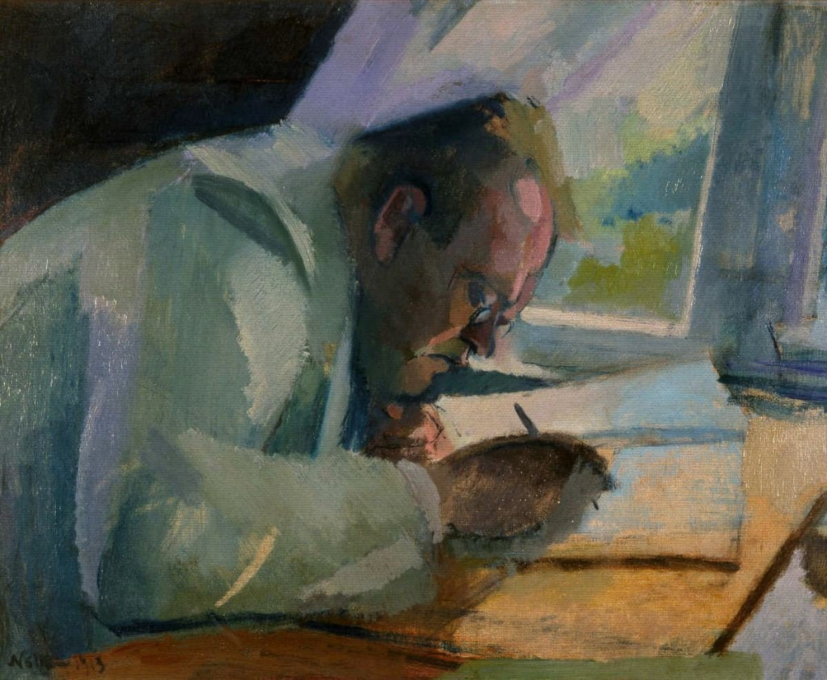 Max Reger